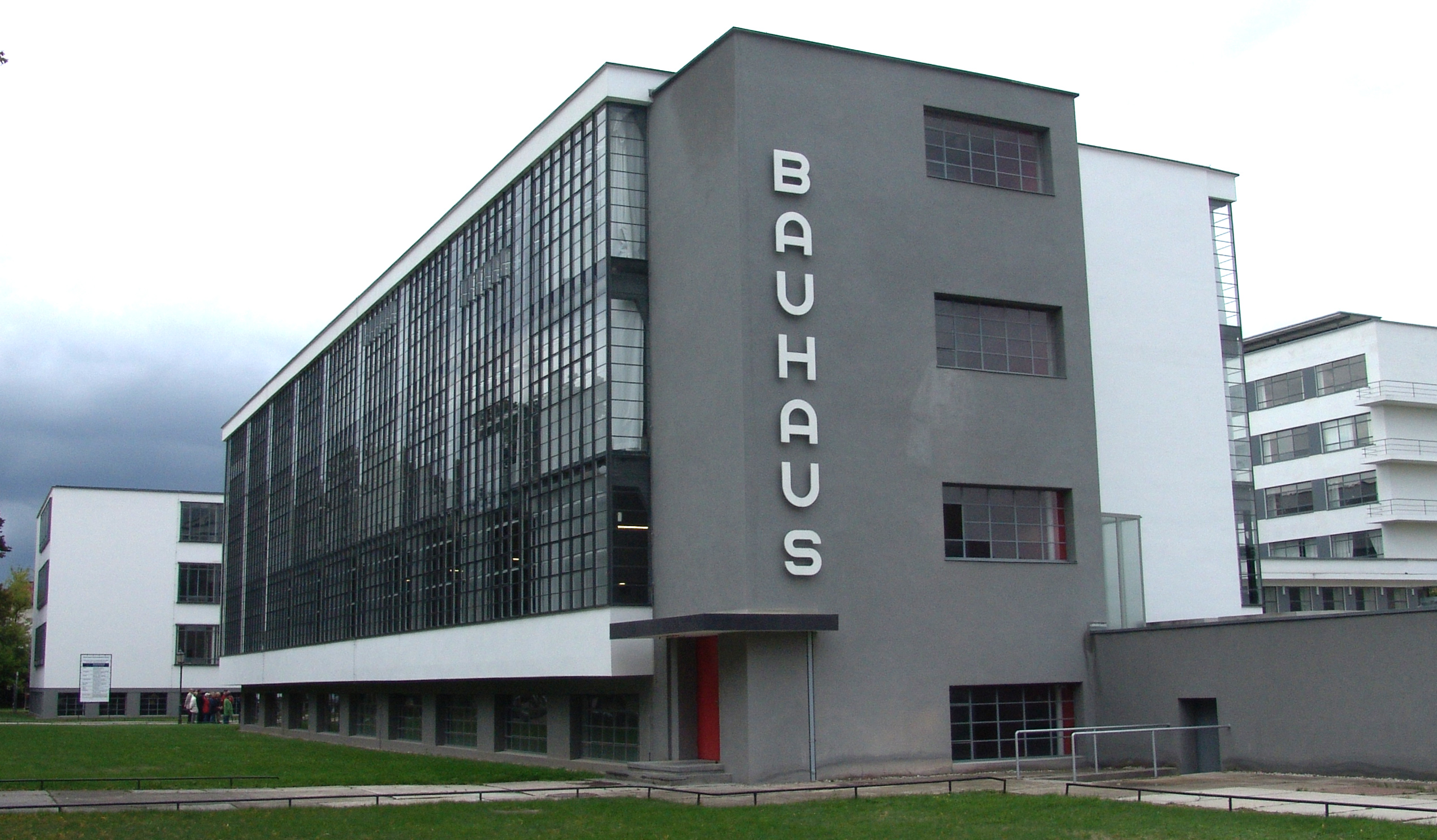 Bauhaus Dessau